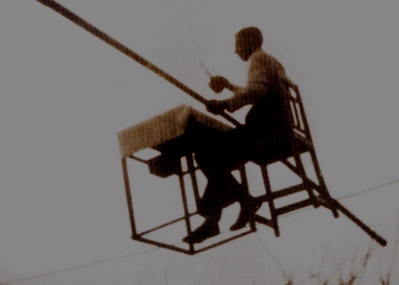 Ivo Aprigliano durante uno spettacolo in piazza Brin a Spezia